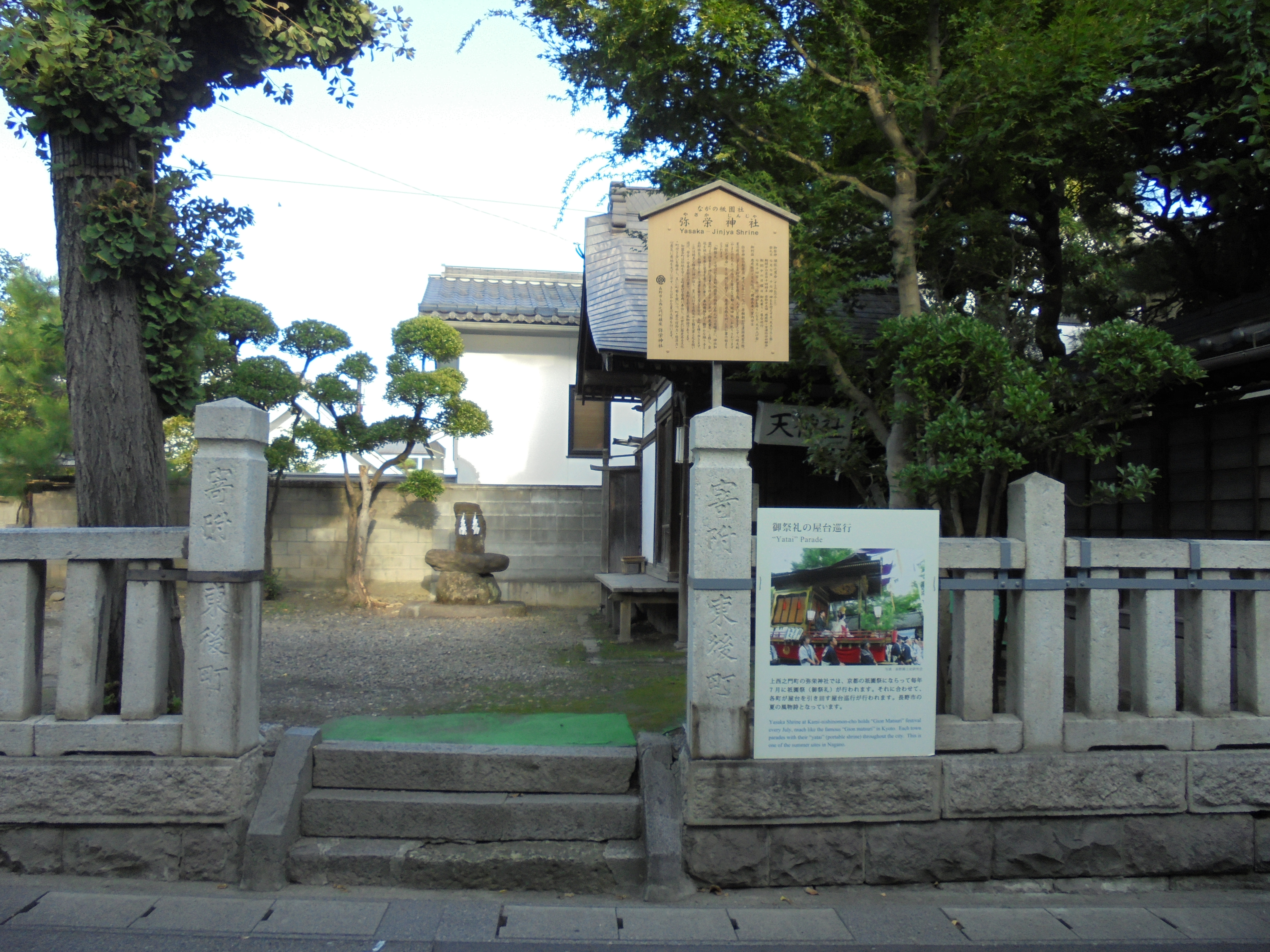 弥栄神社（長野市長野市上西之門町）